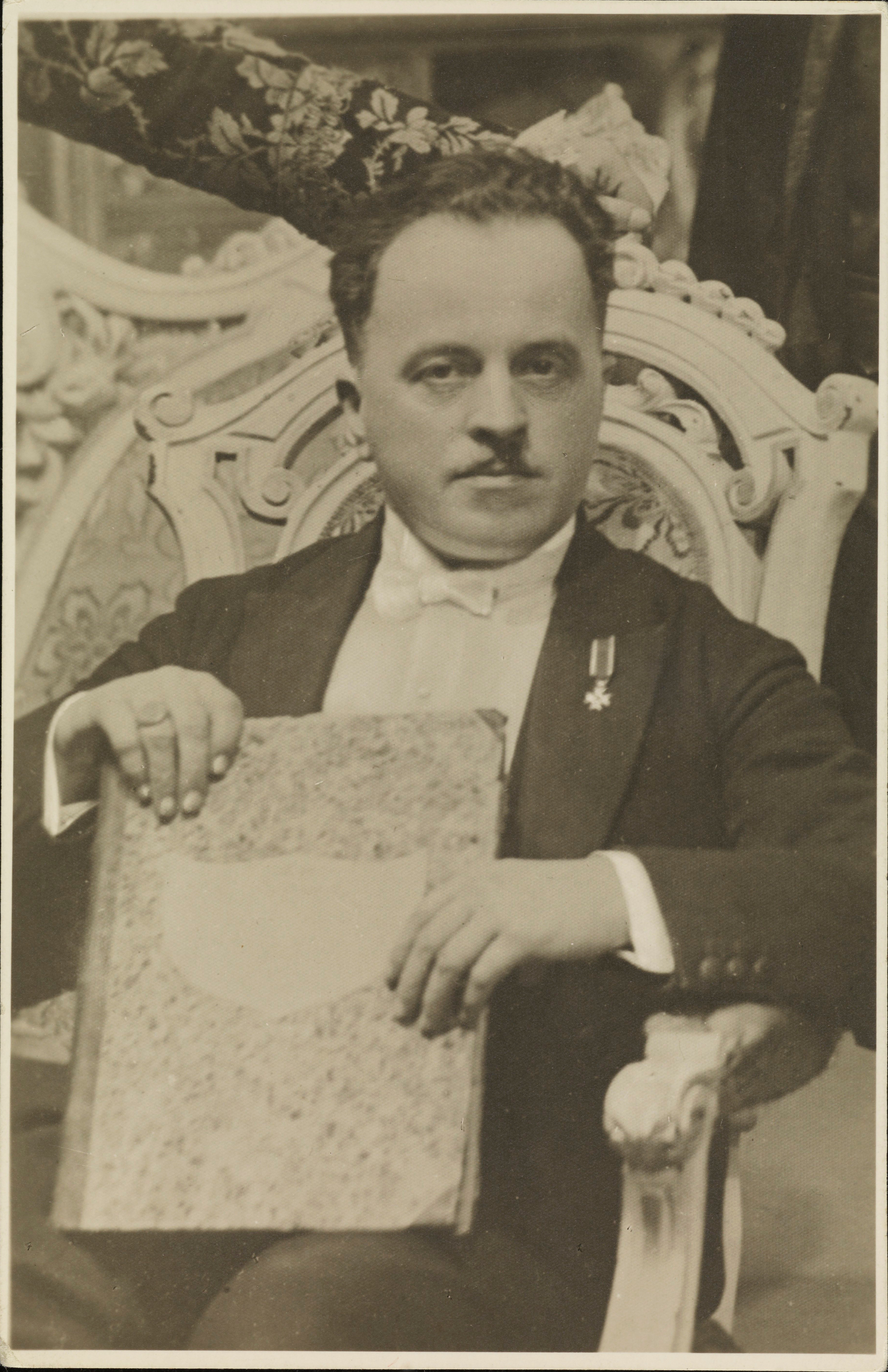 Bolesław Wallek-Walewski